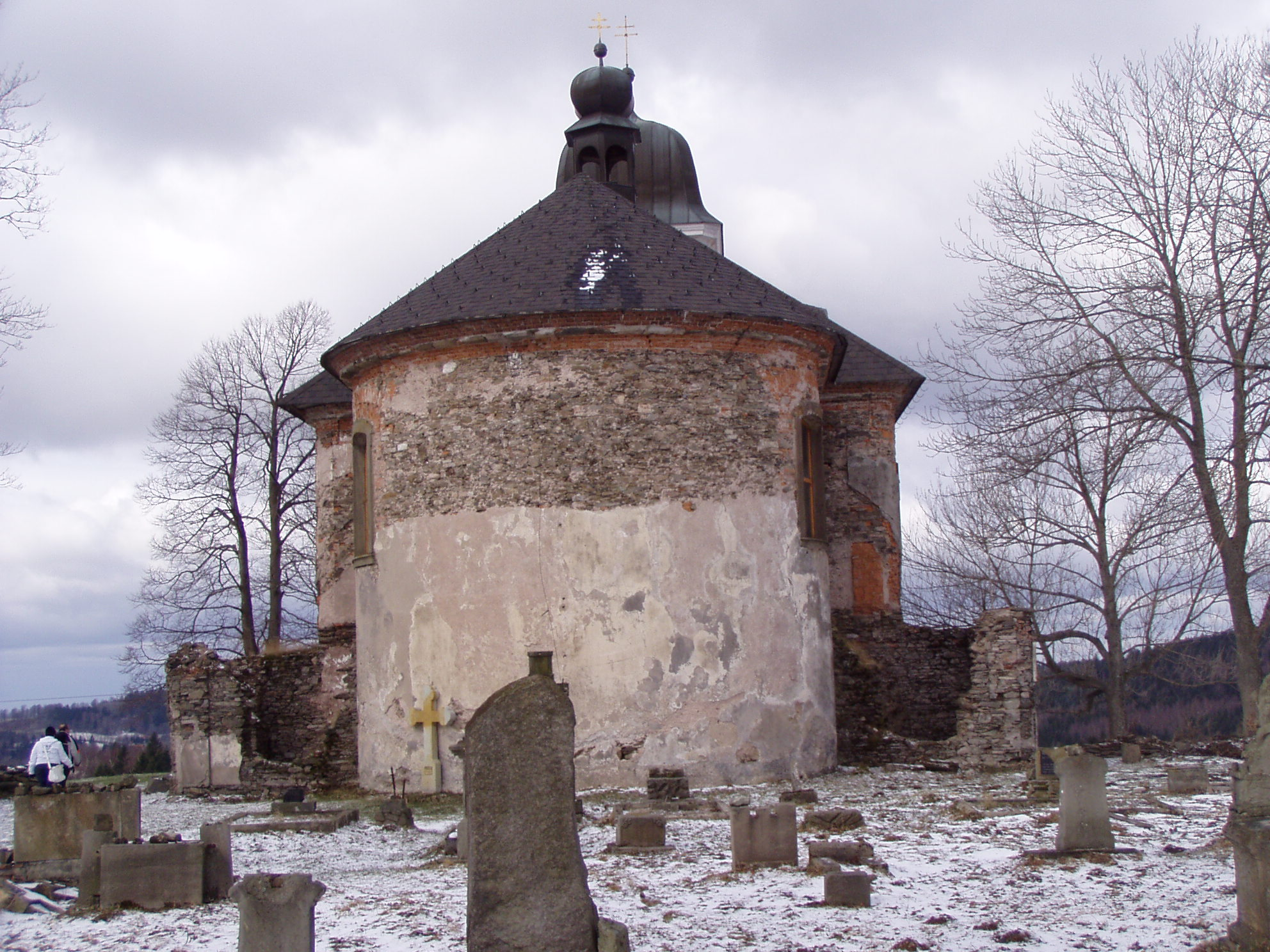 Kostel sv. Matouše Jedlová - zezadu